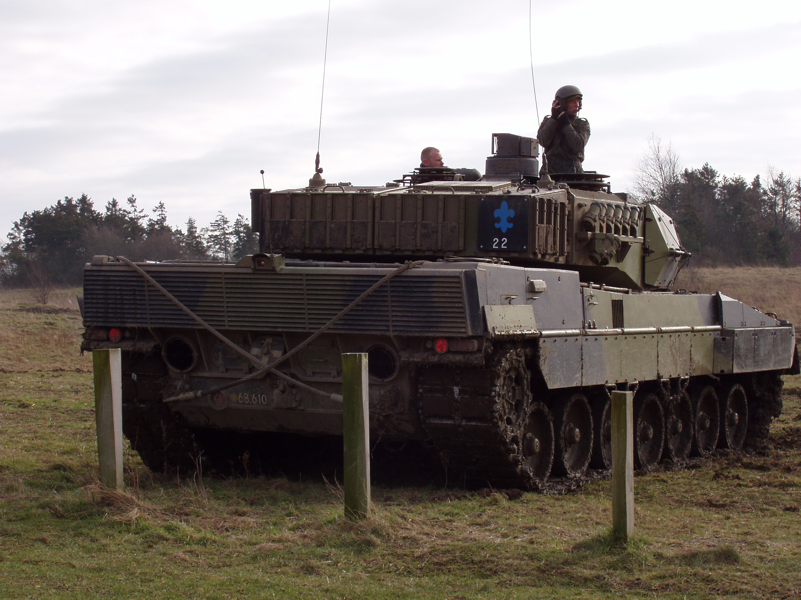 Dansk Leopard 2 A5DK under øvelse på Antvorskov Kasserne